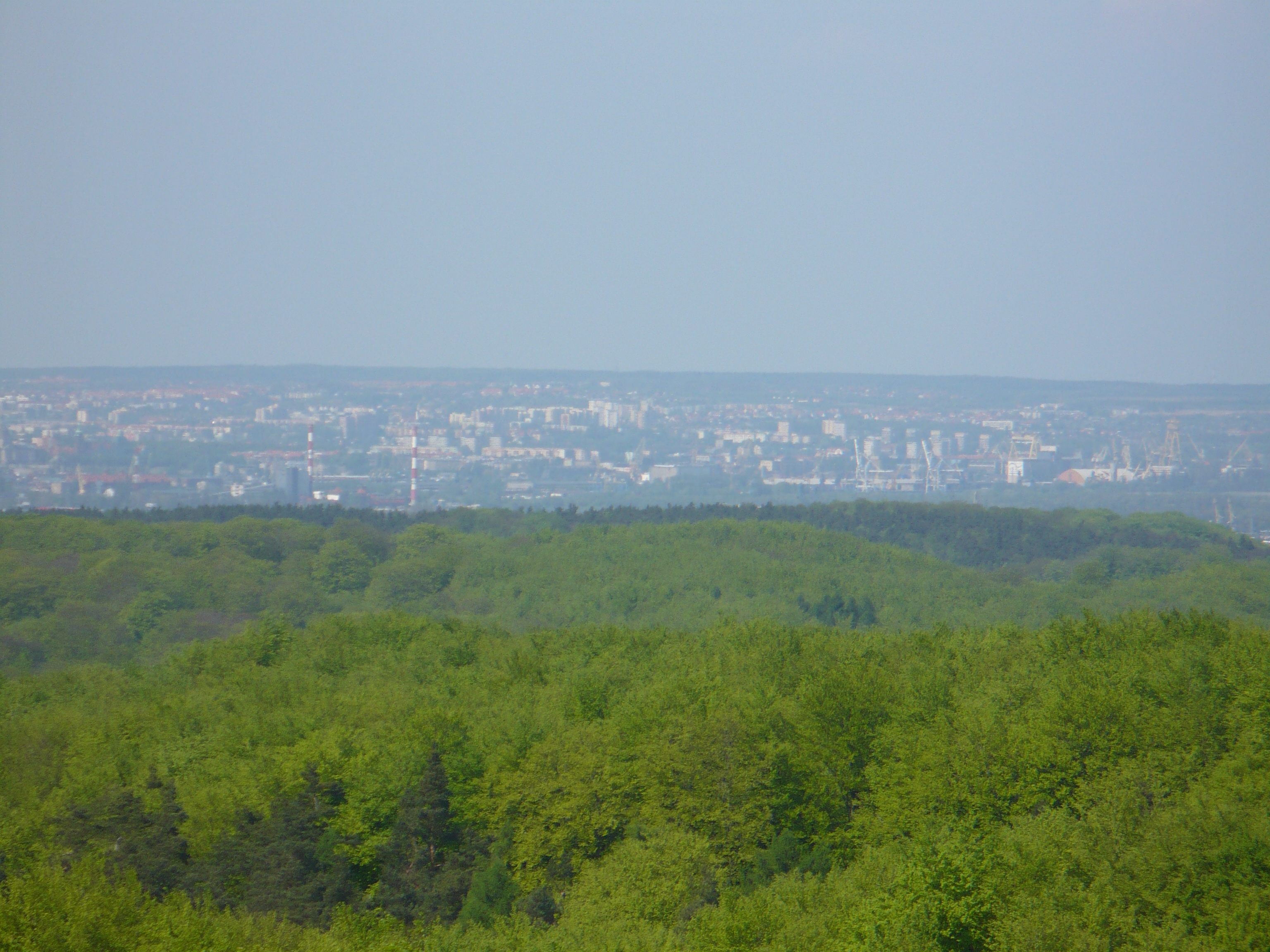 Puszcza Bukowa. W tle lewobrzeżny Szczecin i Wzgórza Warszewskie.